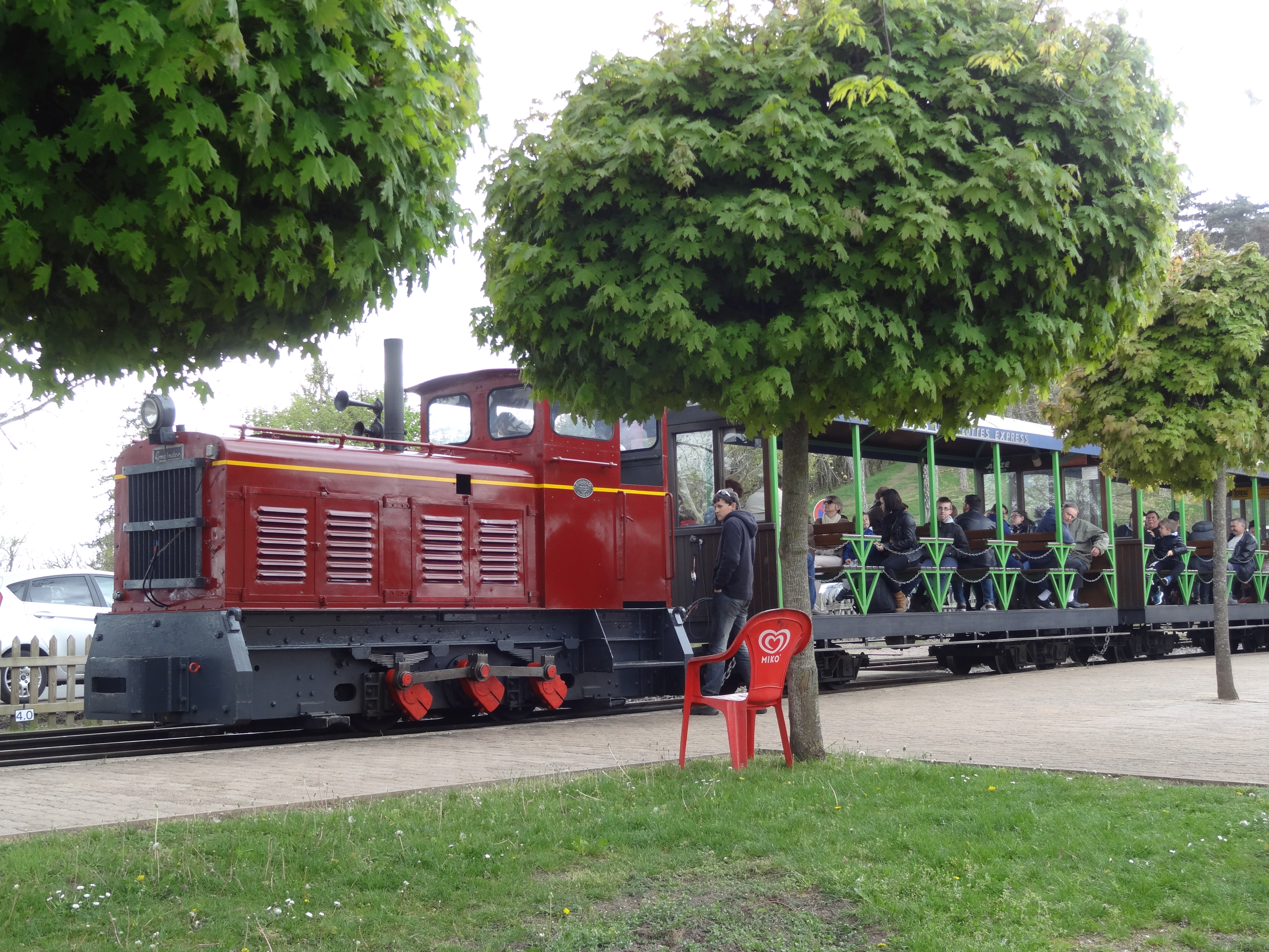 Le train du parc touristique des Combes